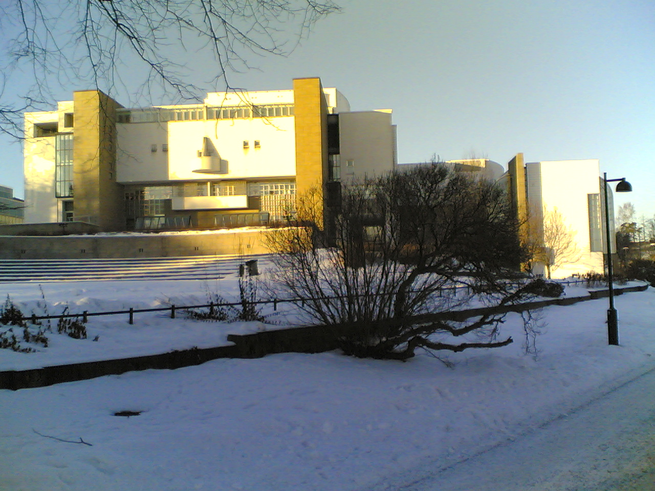 Suomen Kansallisooppera